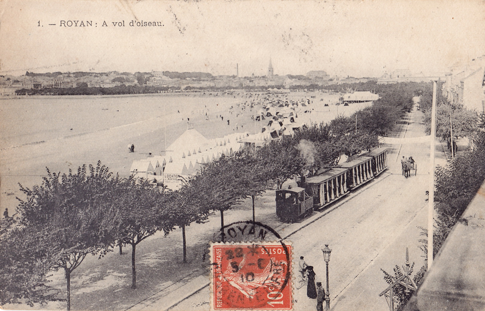 Carte postale ancienne sans mention d'éditeur , 1 : ROYAN - A vol d'oiseau